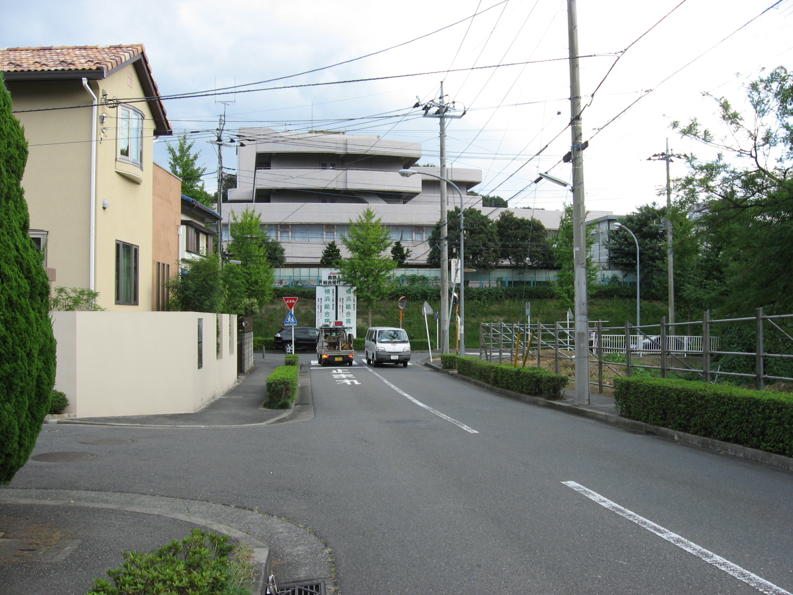 横浜市青葉区のもみの木台と鉄町の境